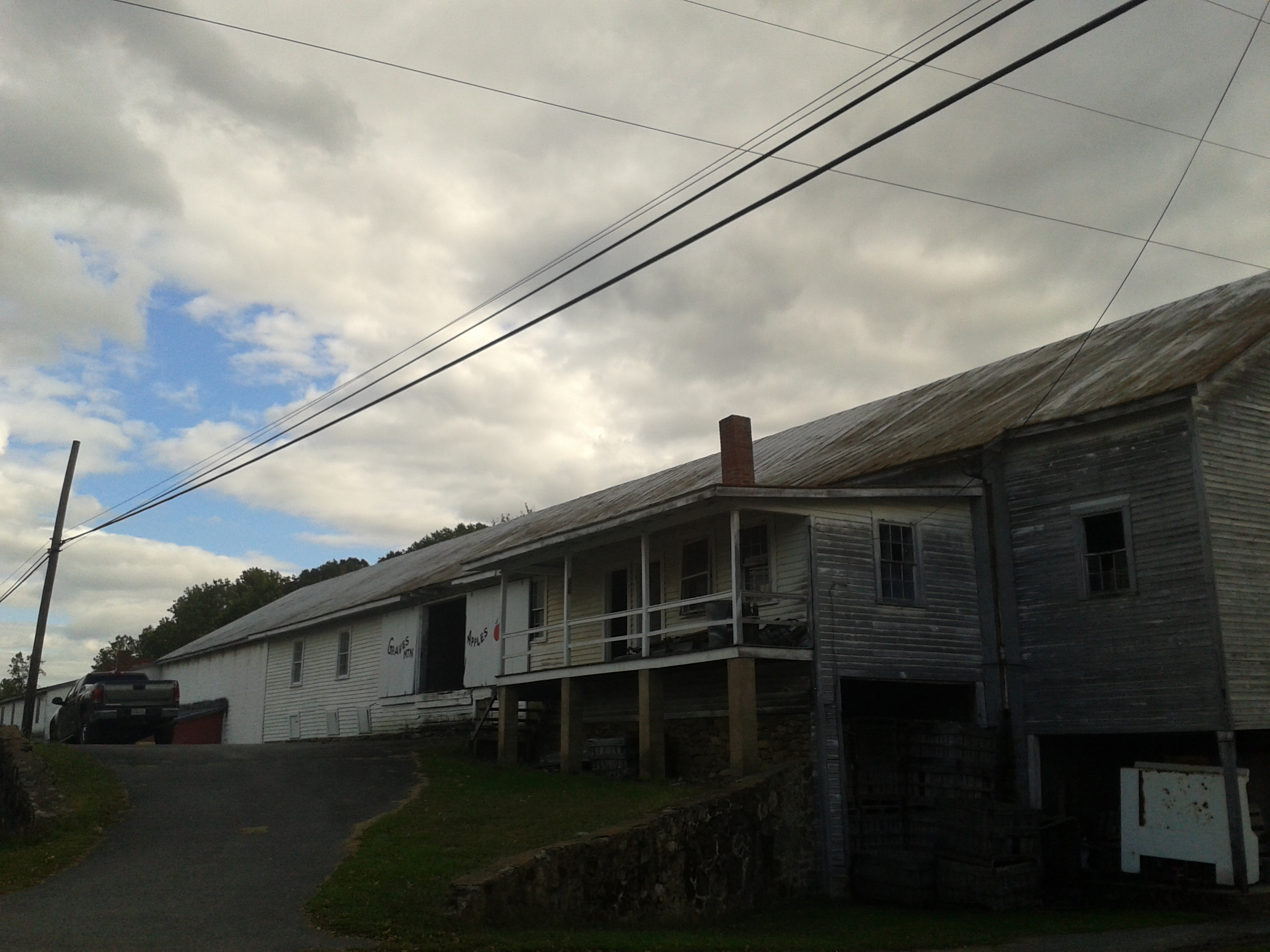 Central Syria, Virginia